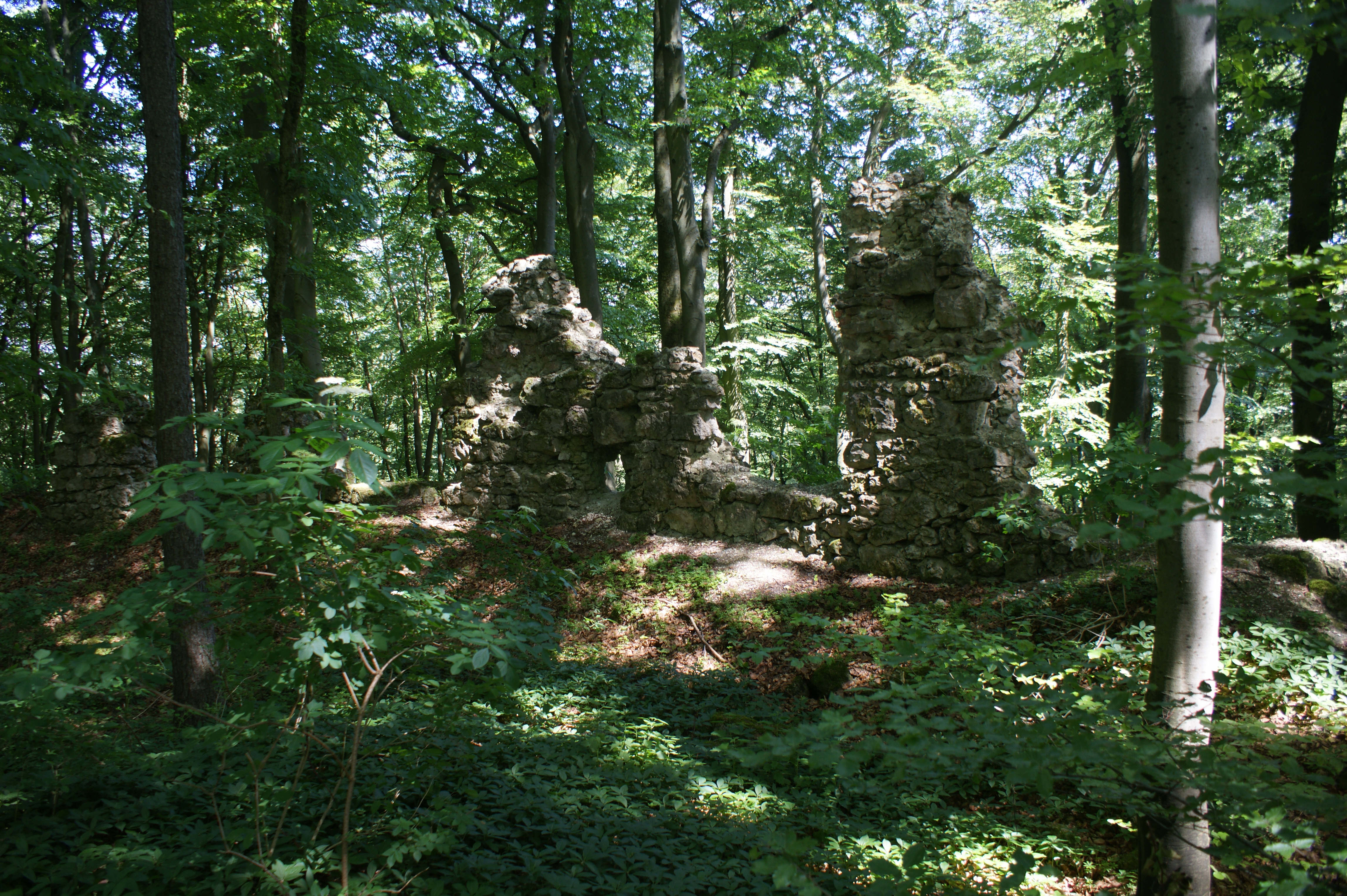 Burgruine Helfenberg bei Velburg